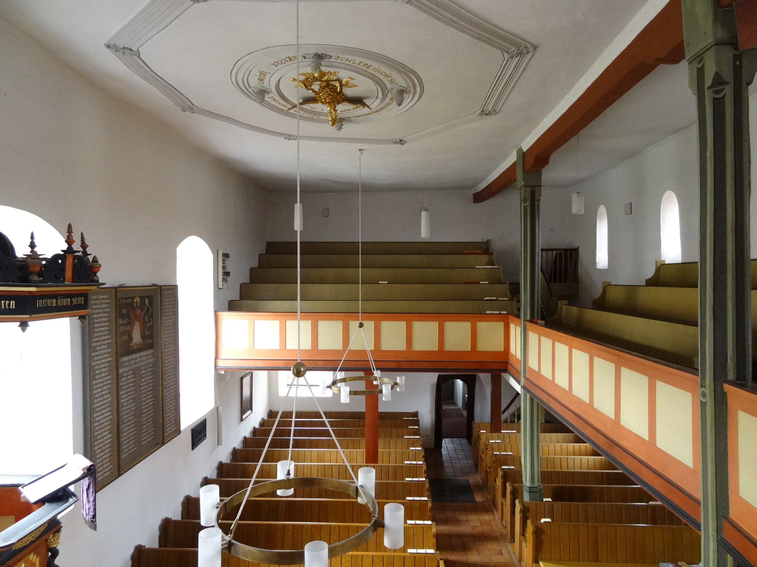 Evangelische Kirche (Ulfa)